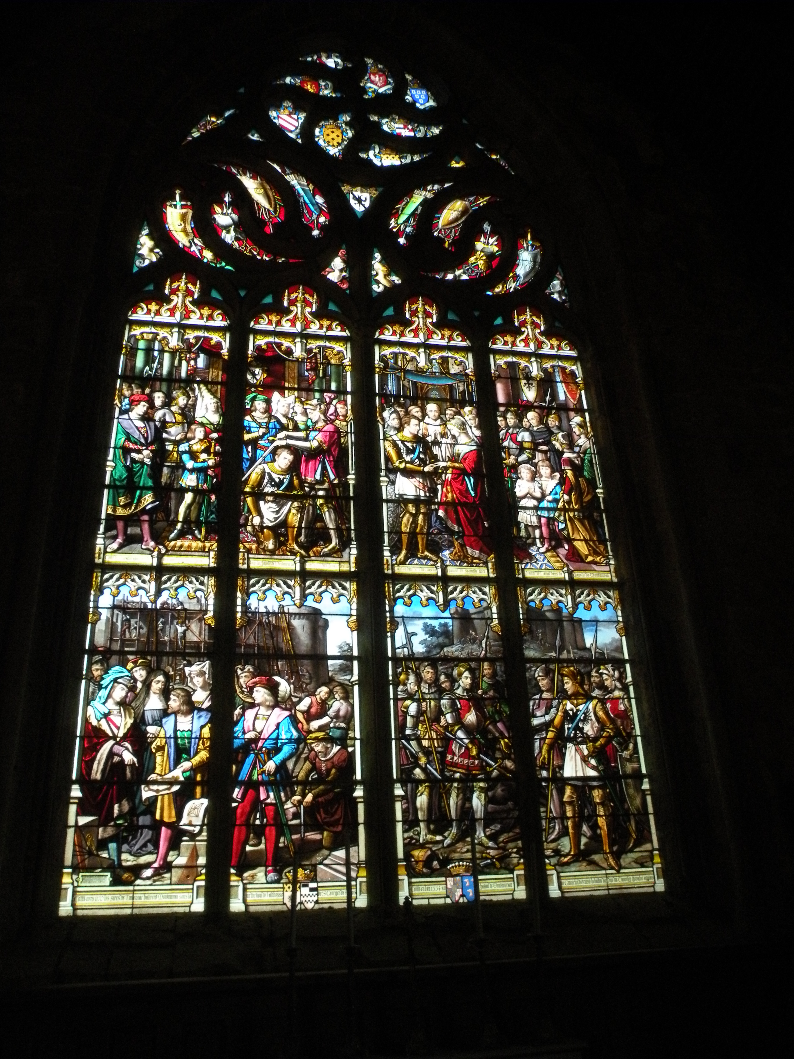 Le château de Montmuran aux Iffs.